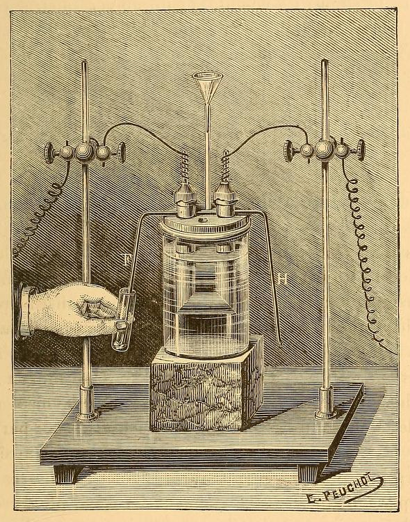 Figure 5 de Recherches sur l’isolement du fluor, page 41